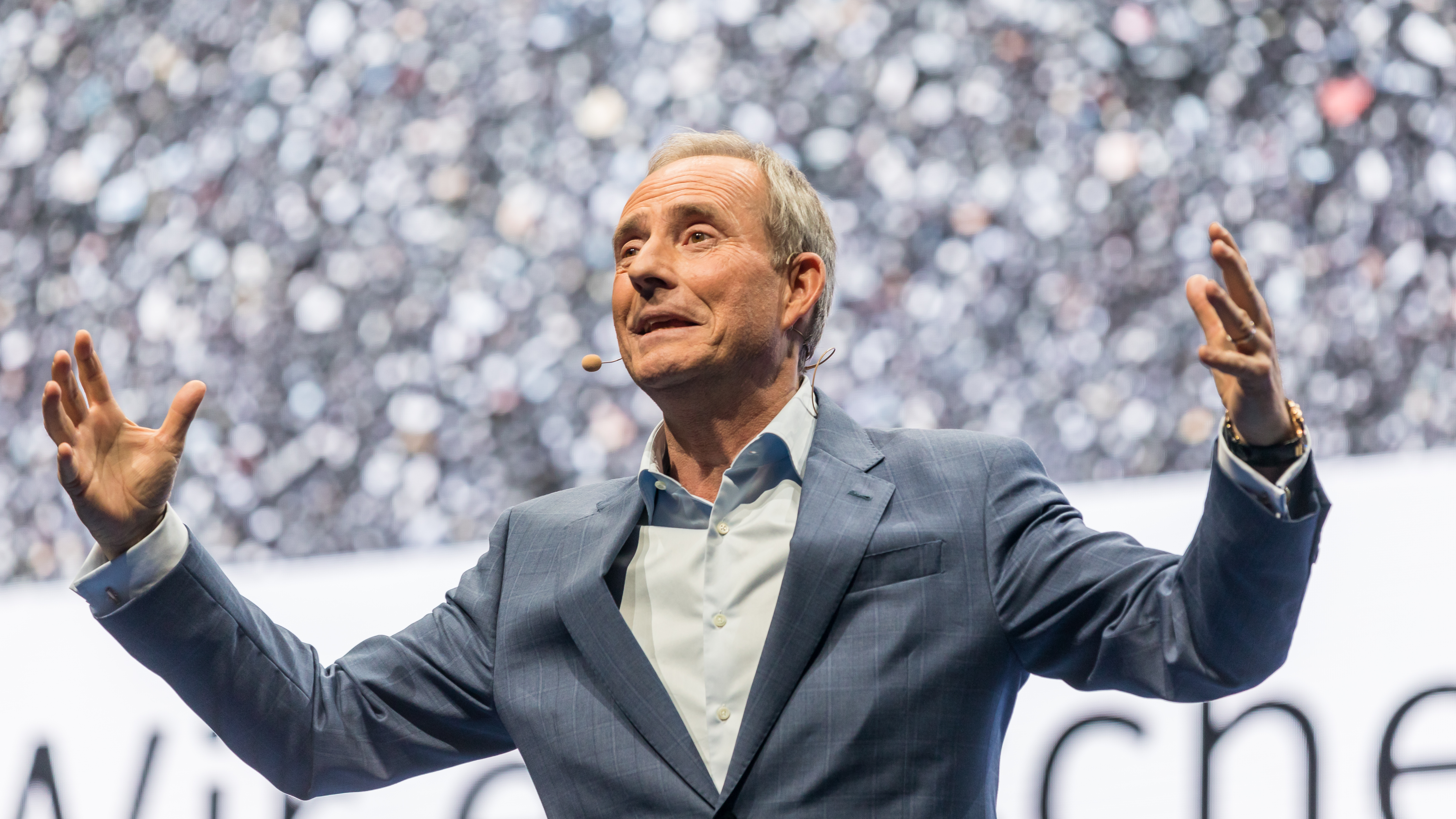 GedankenTanken Köln 2018 - 04 - Redner Bodo Schäfer